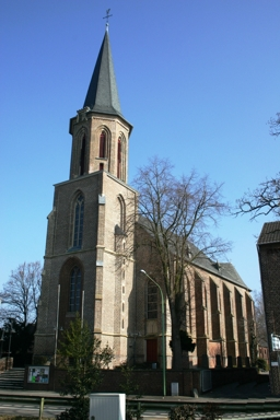 katholische Kirche, St. Johannes (Evangelist), in Düren Gürzenich, Schillingsstraße